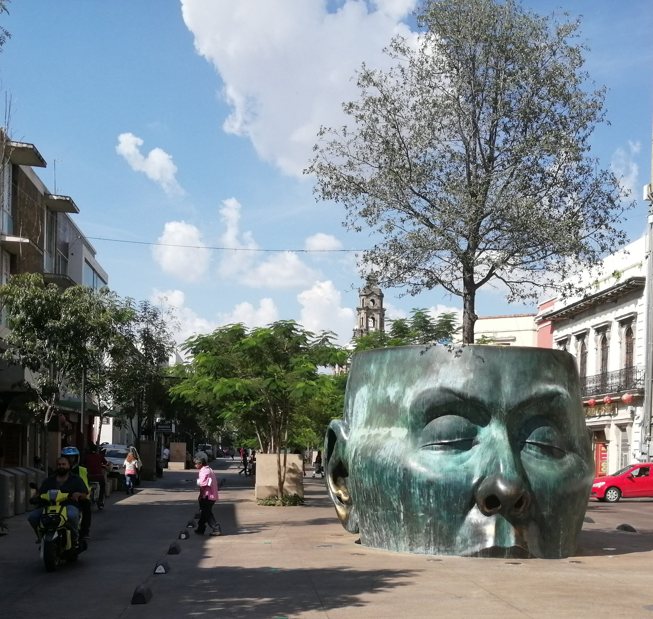 Árbol adentro” de José Fors